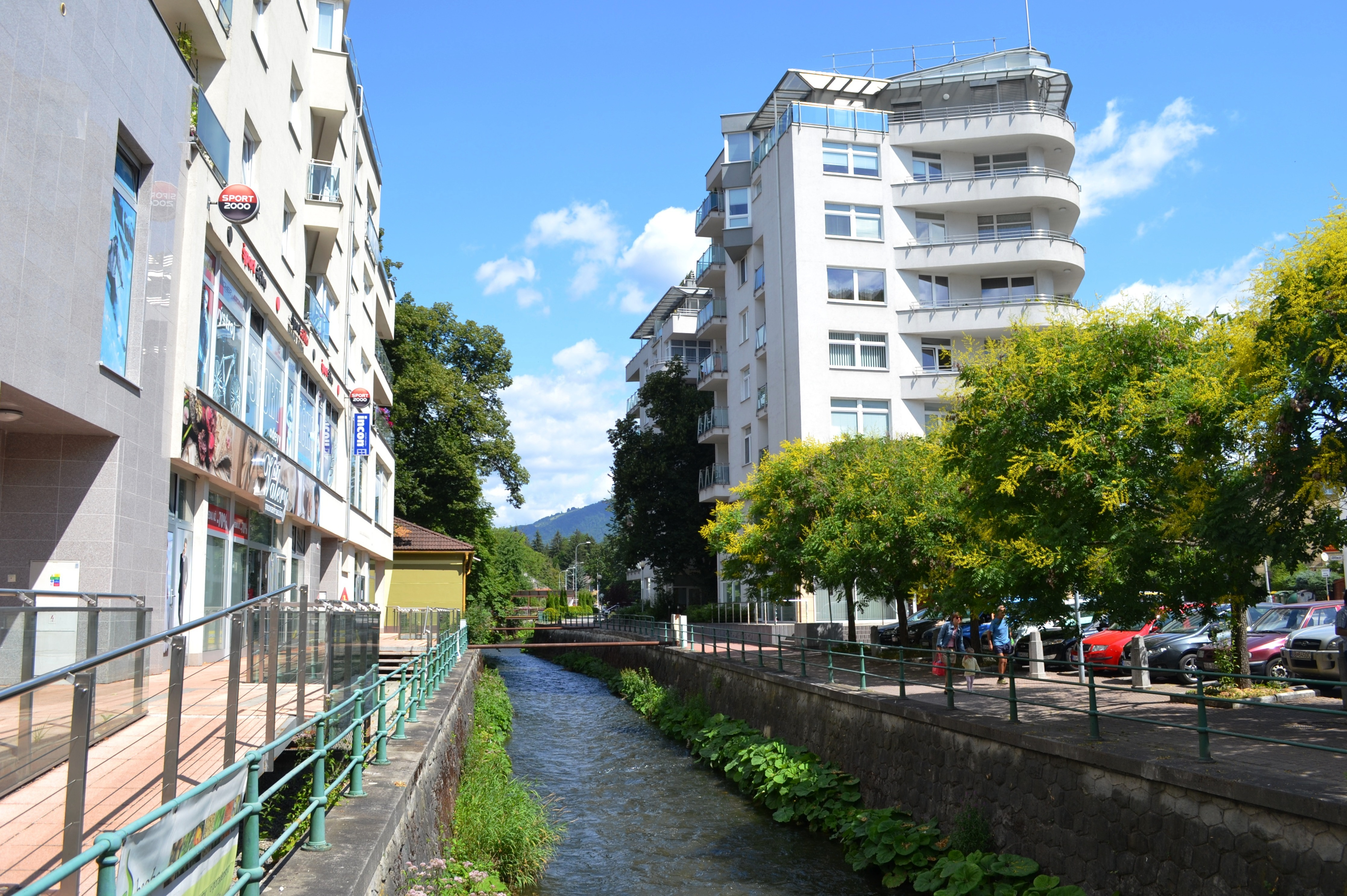 Riečka Bystrica pretekajúca Banskou Bystricou